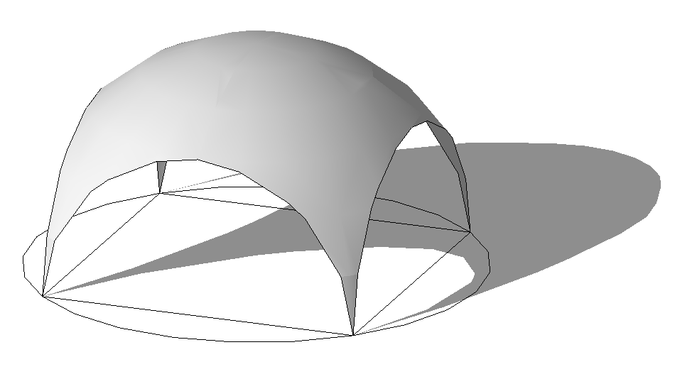 Wycinek sfery